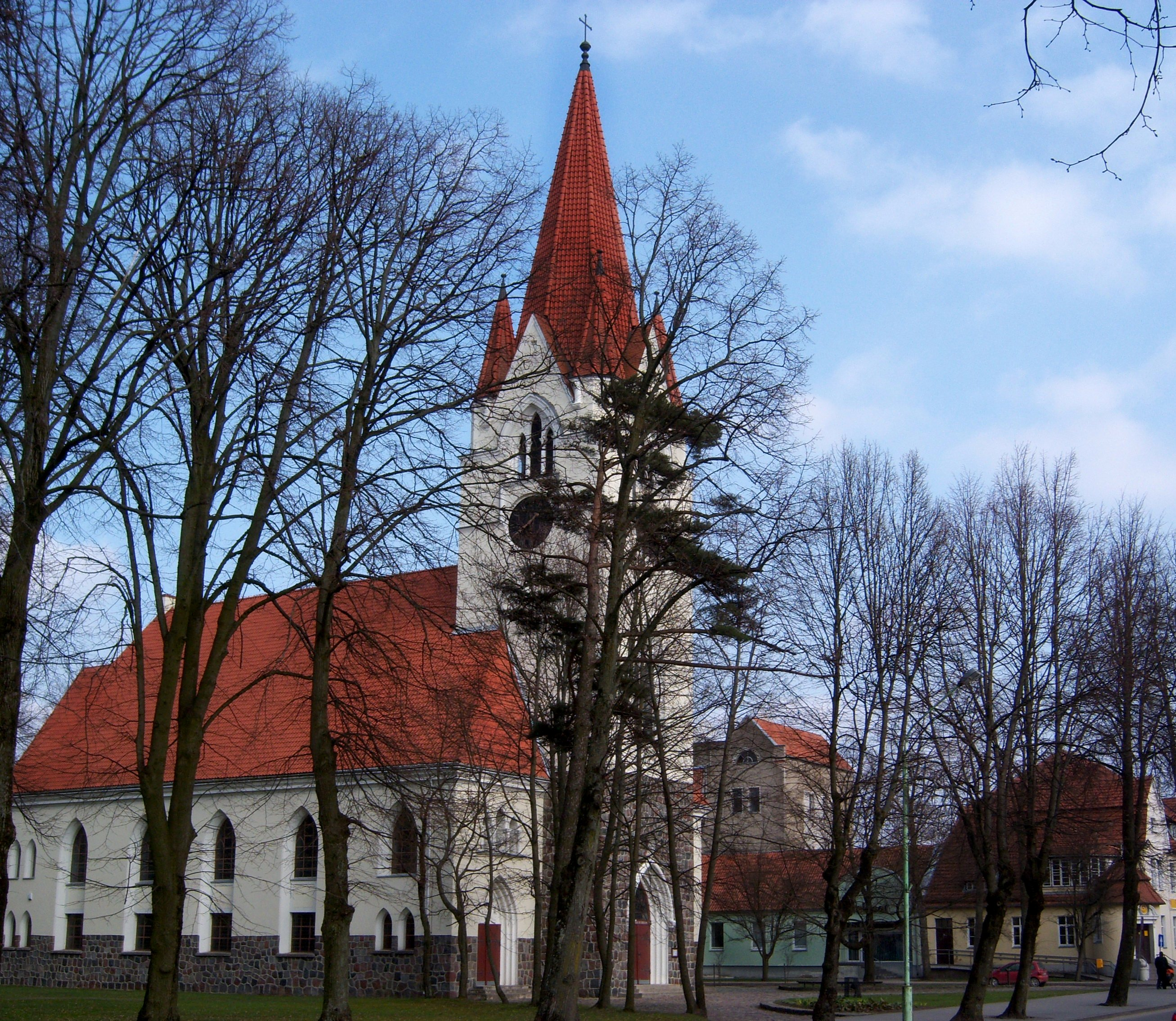 Šilutės evangelikų liuteronų bažnyčia ir paštas